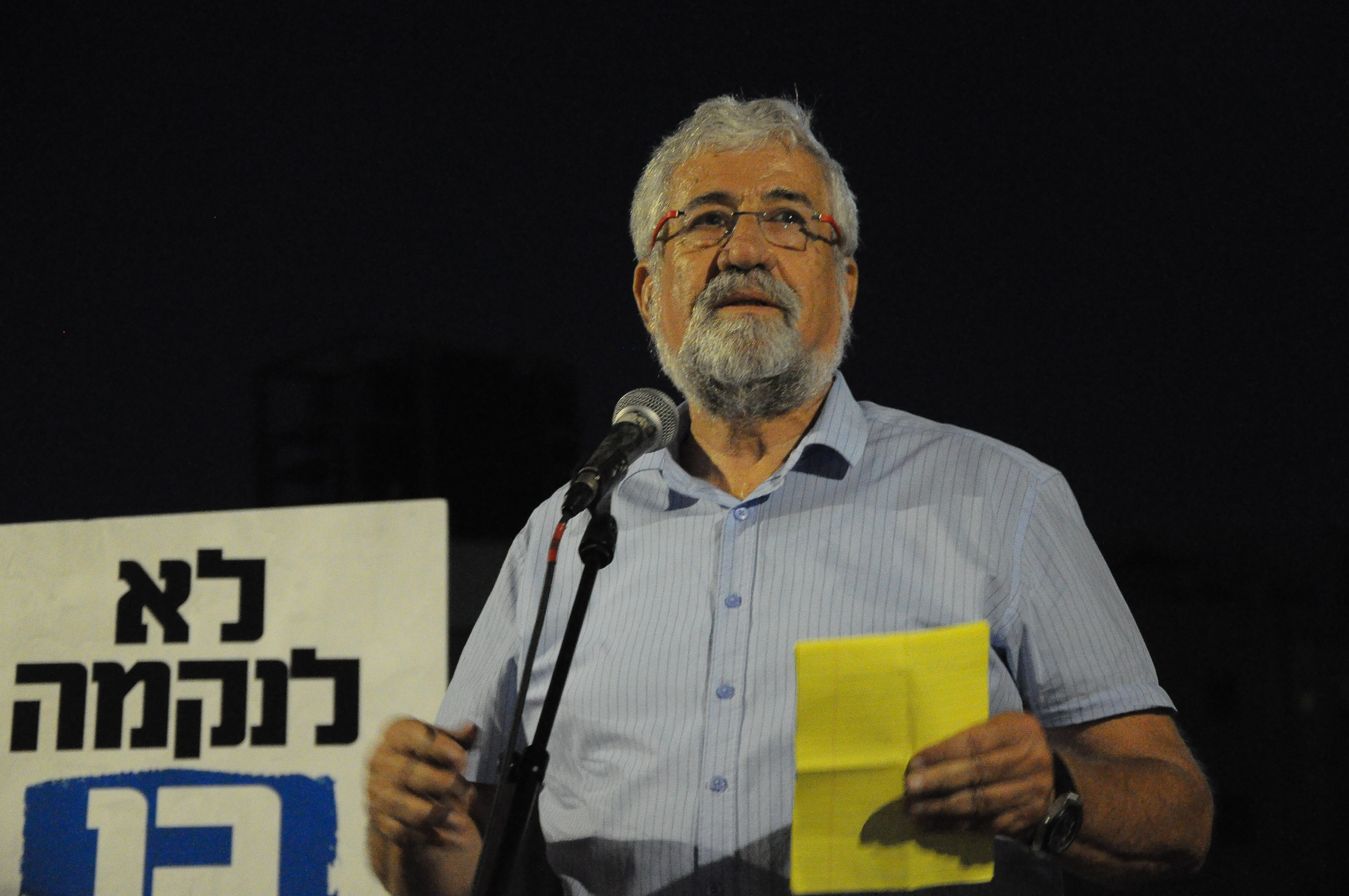 עמרם מצנע במהלך הפגנה בכיכר הבימה , הפגנה למען השלום